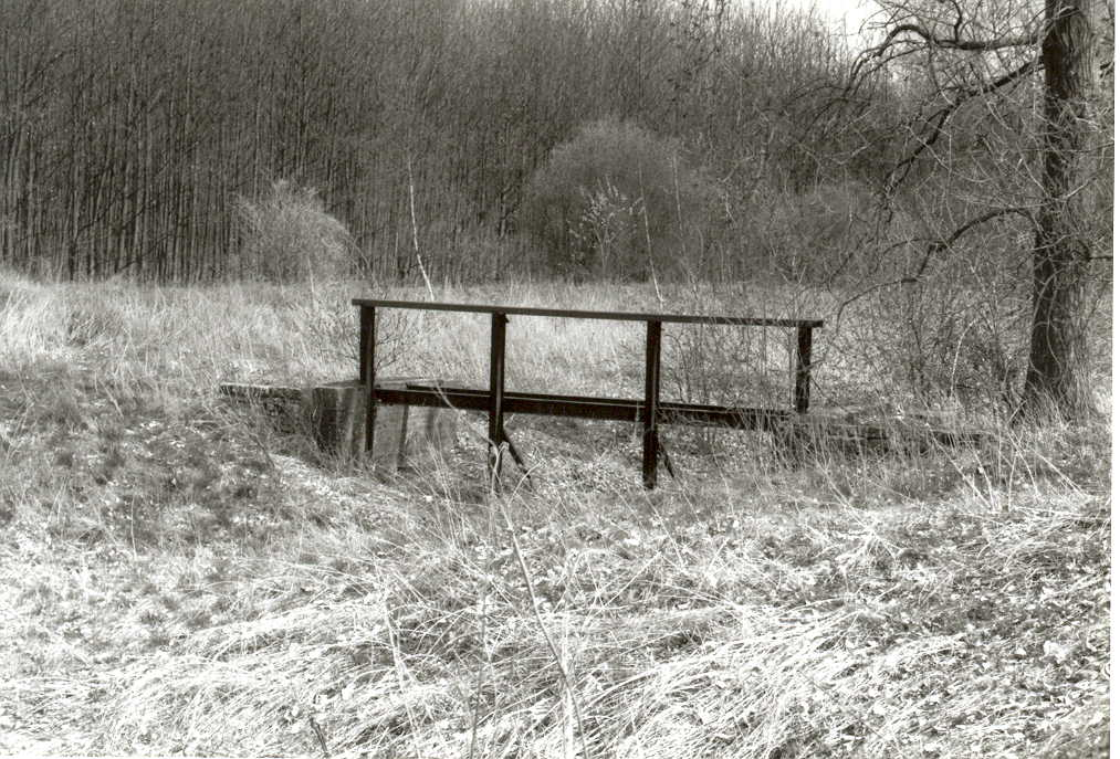 Ein völlig zugewachsener Teil des ehemaligen Nordkanales bei Kaarst